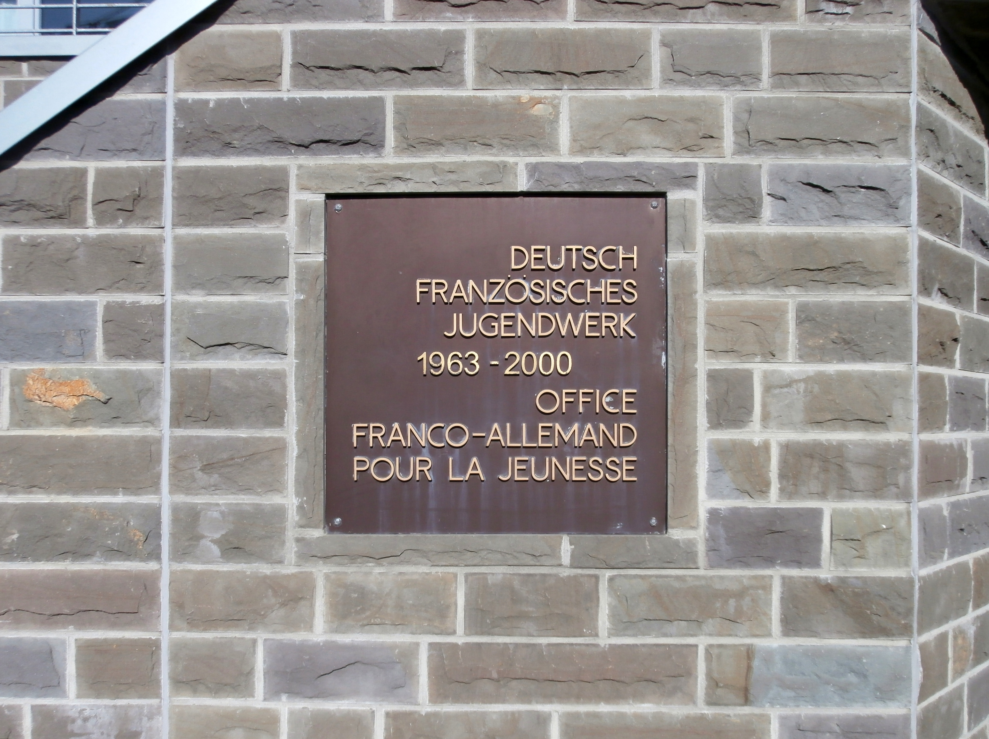 Informationstafel zur Erinnerung an das an dieser Stelle ehemals ansässige Deutsch-Französische Jugendwerk an dem Wohnkomplex Rhöndorfer Straße 23a–23f, Rhöndorf, Bad Honnef